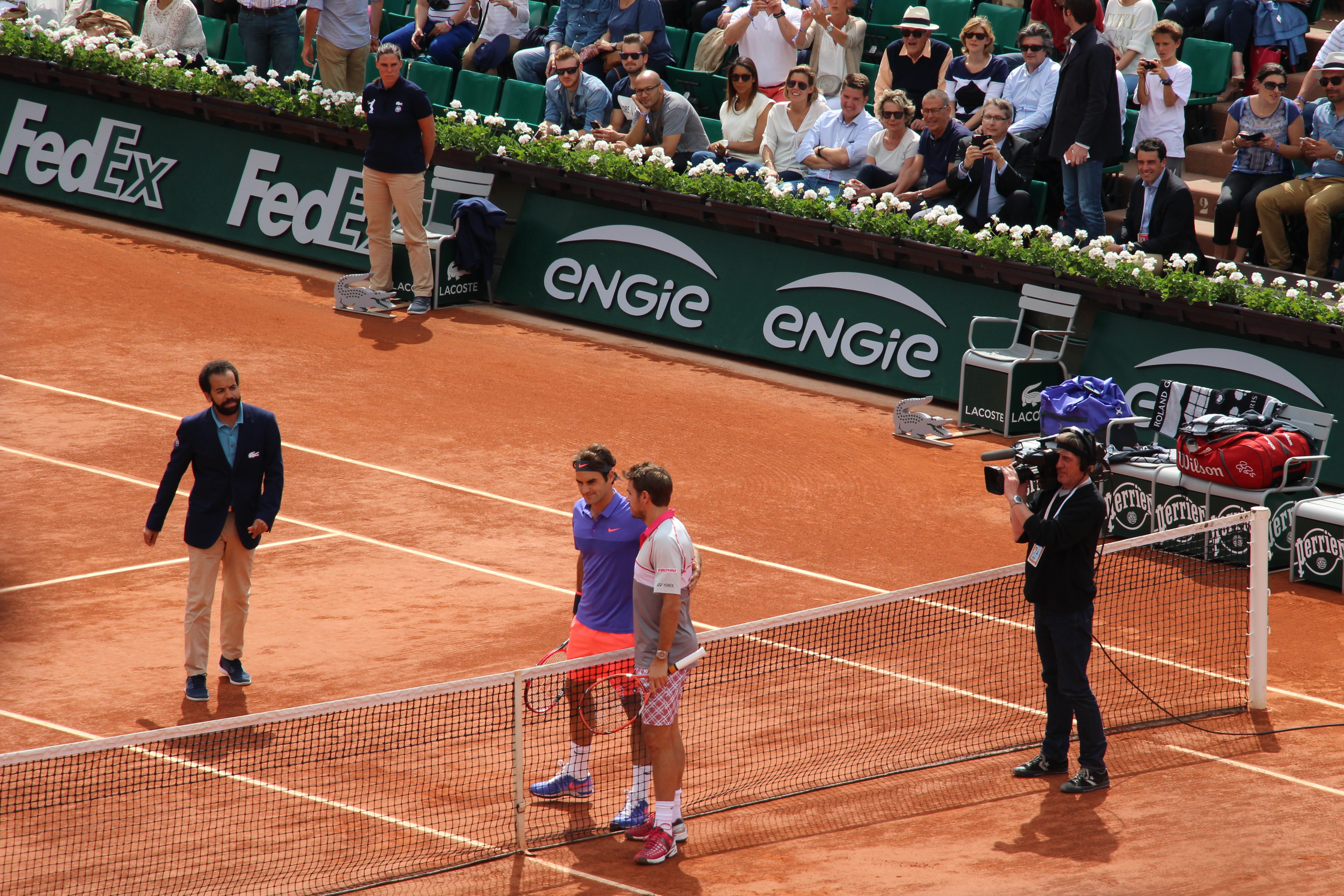 Swiss Roger Federer & Stan Wawrinka at 2015 French Open. 2015 Roland Garros.